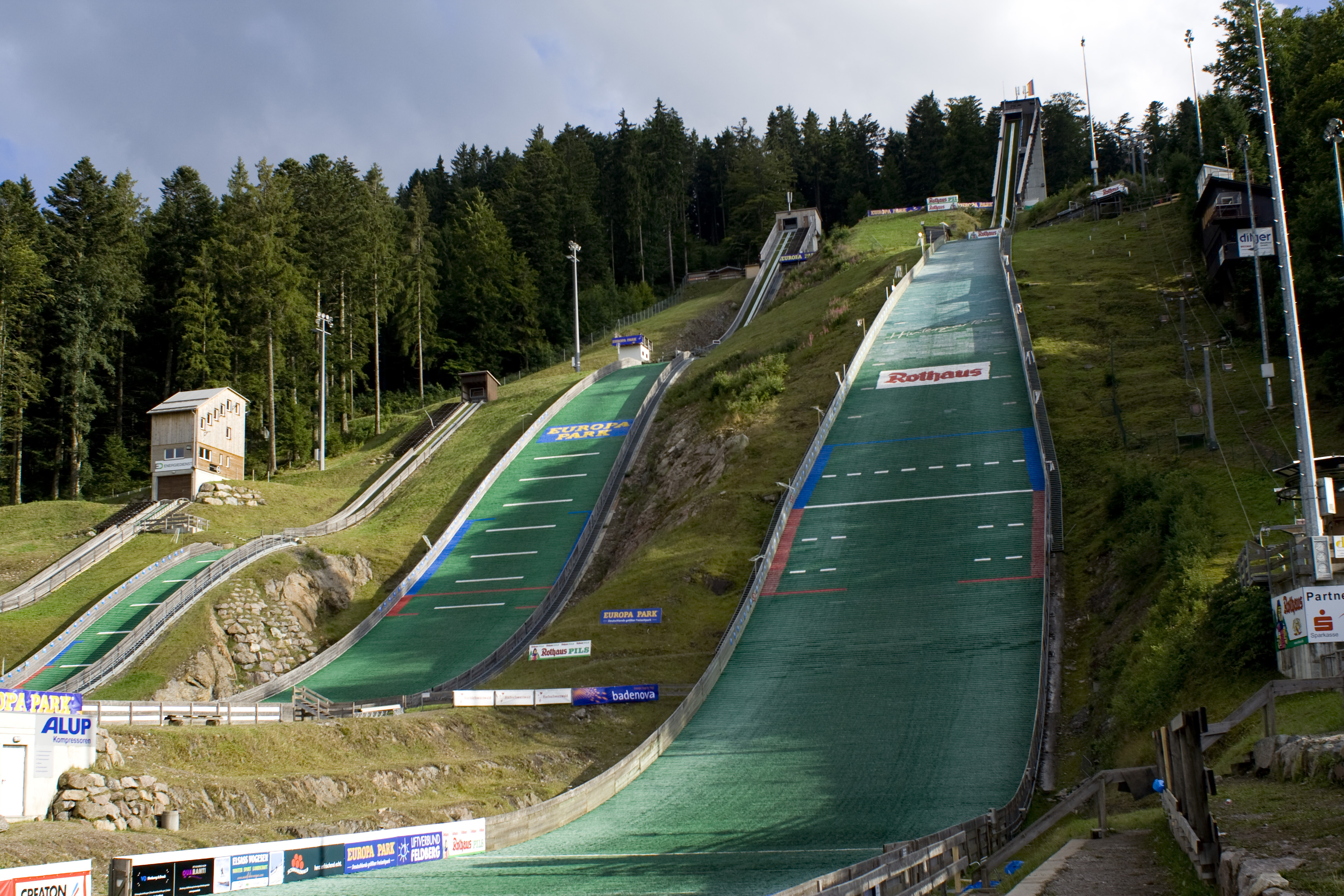 ski jumps at Hinterzarten